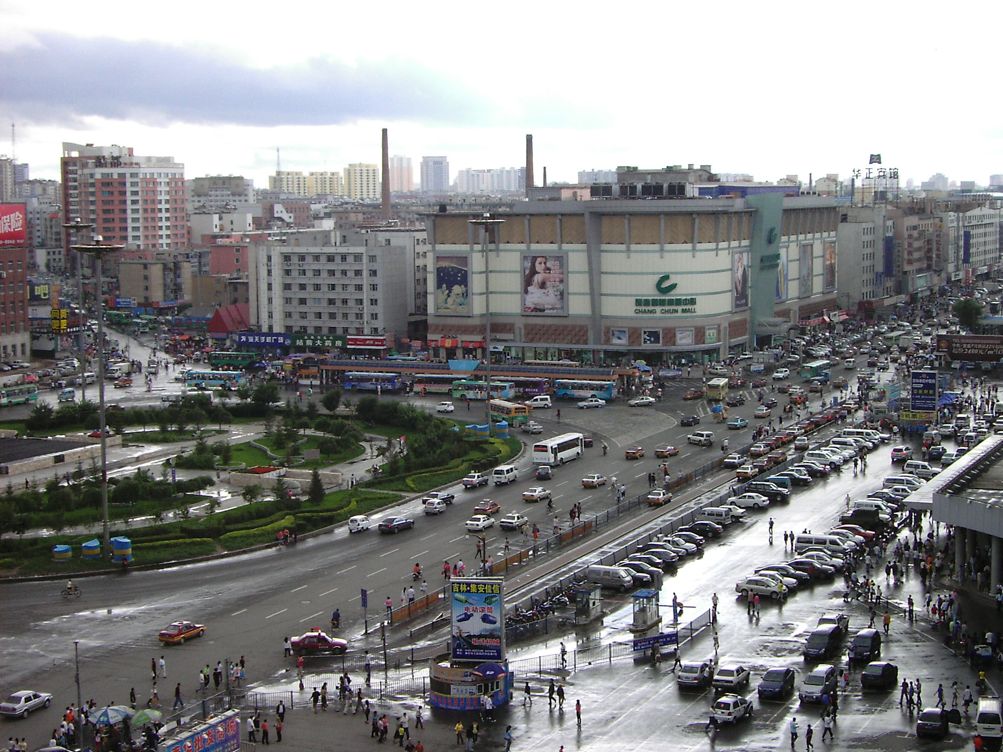 站前广场